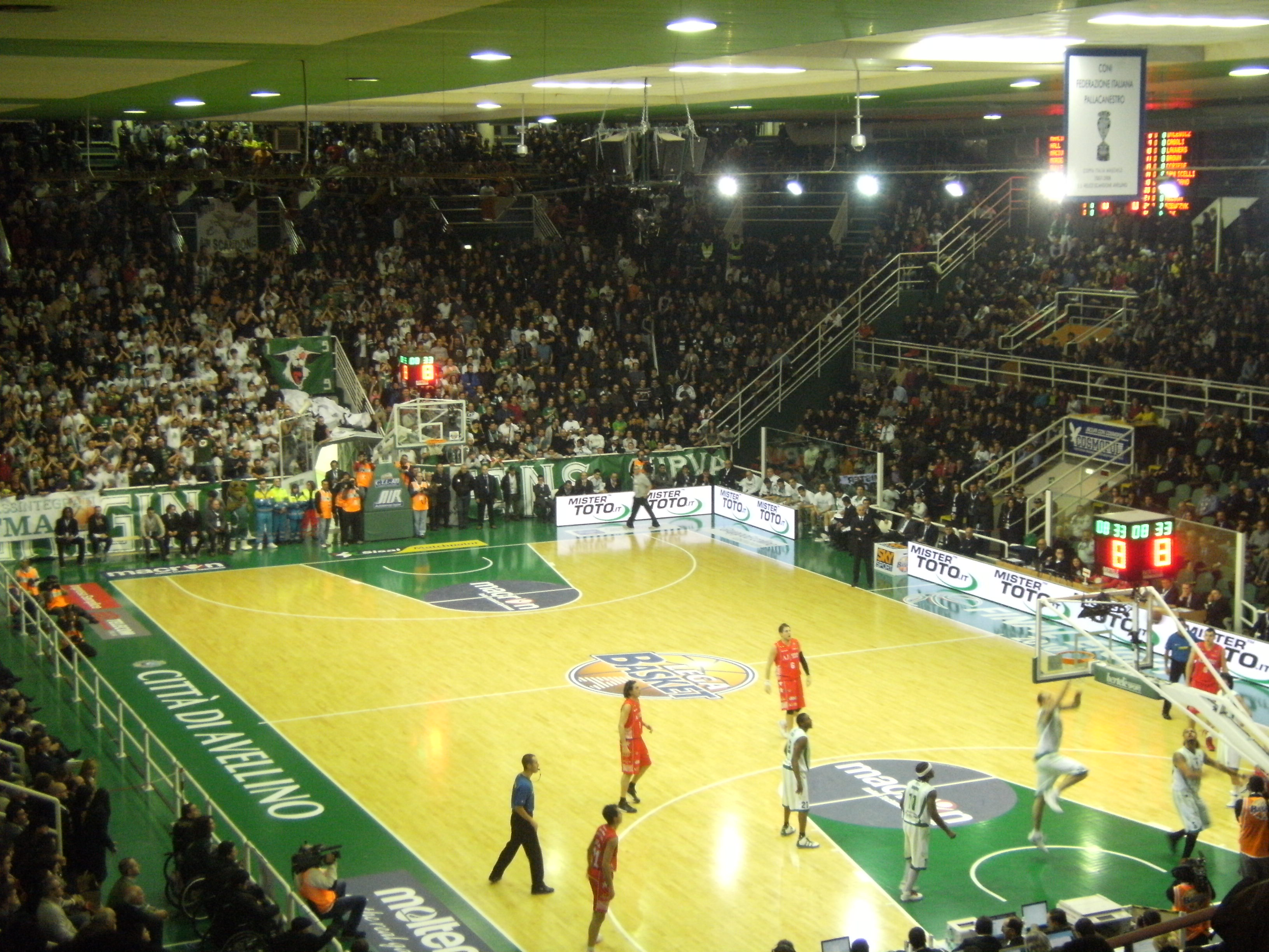 Coppa Italia di pallacanestro maschile 2010 Scandone Avellino - Olimpia Milano Quarti di finale